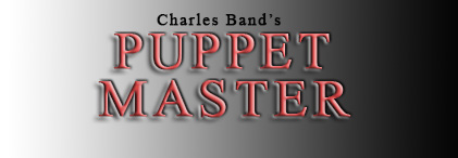 Puppet master (Gyilkos bábok) cimű amerikai horrorfilm logója